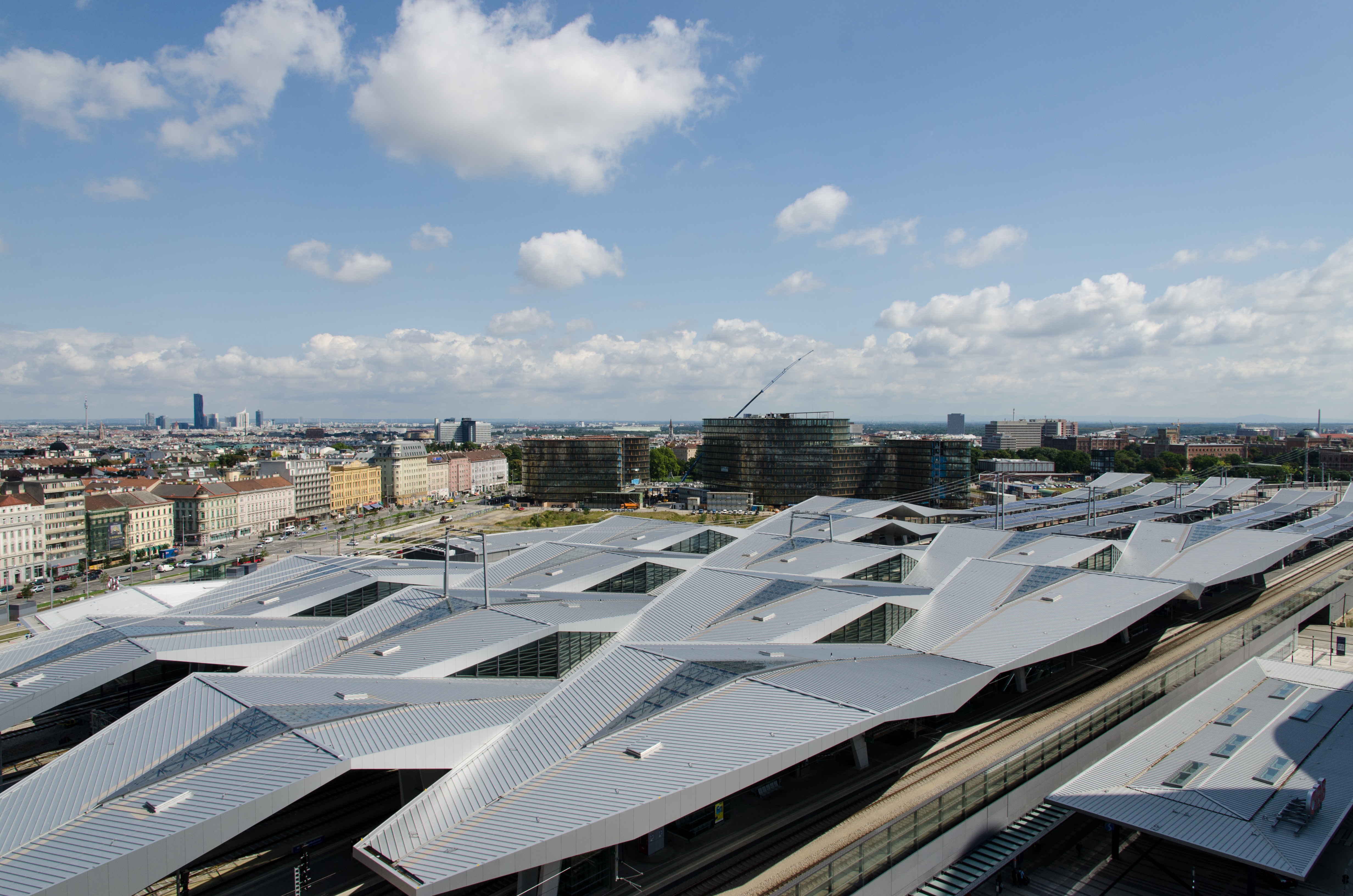 DSC_3554_LR